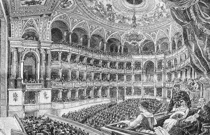 Az Operaház nézõtere, 1894